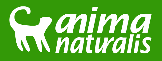 Logo de AnimaNaturalis Internacional